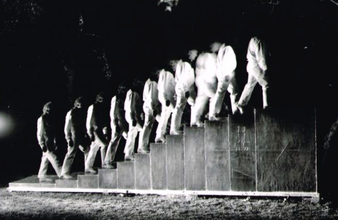 Sinustreppe. 1/2 Stockwerk. Höhe: 1,58 Meter, 11 Stufen. Die begehbare Treppenskulptur besteht aus einer mit Bleiplatten verkleideten Holzkonstruktion. Diese Sinustreppe war am Bauhaus Dessau und in Bonn vor dem Bauministerium ausgestellt.